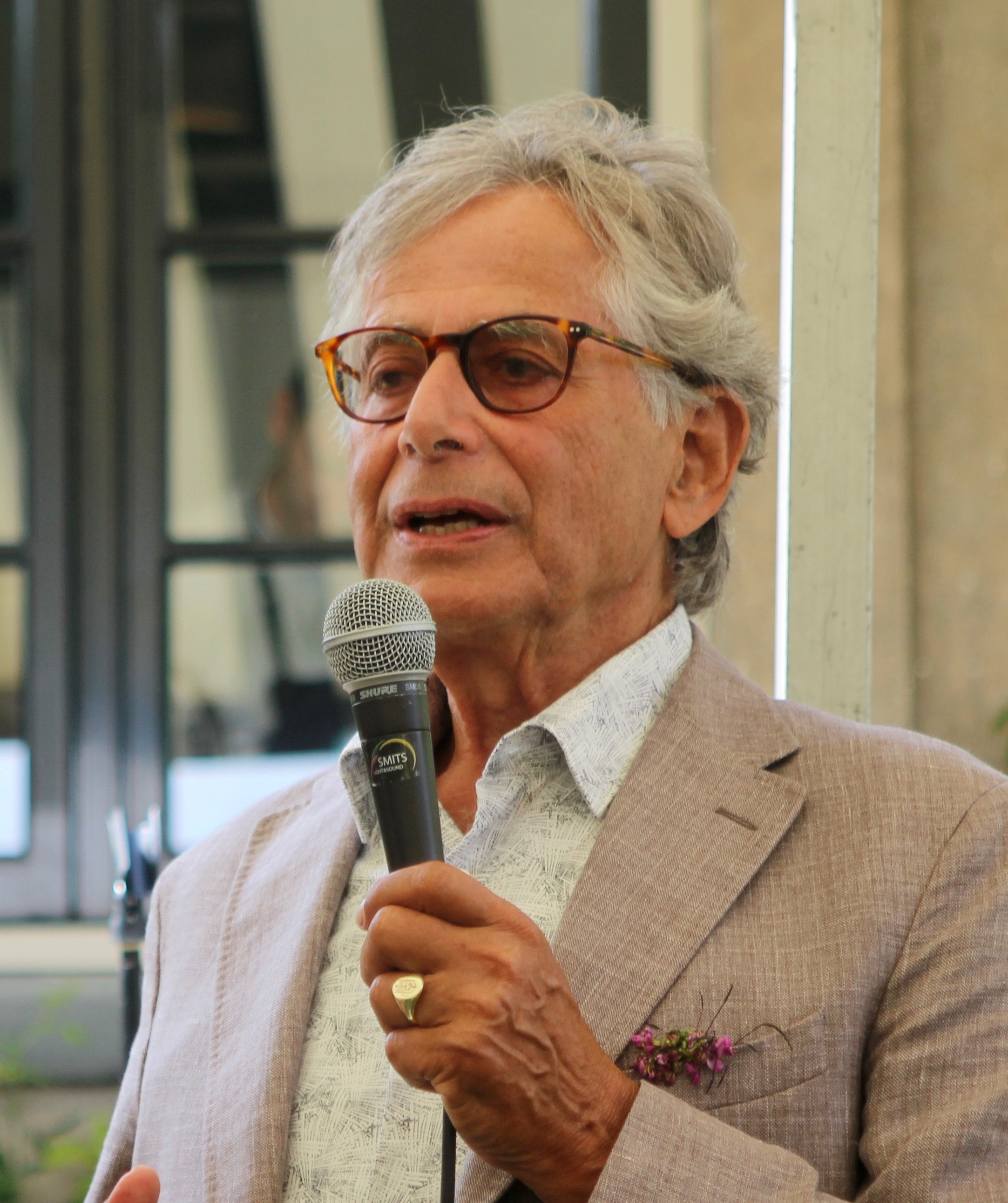 Jaap Wertheim geeft een speech over zijn leven en werk